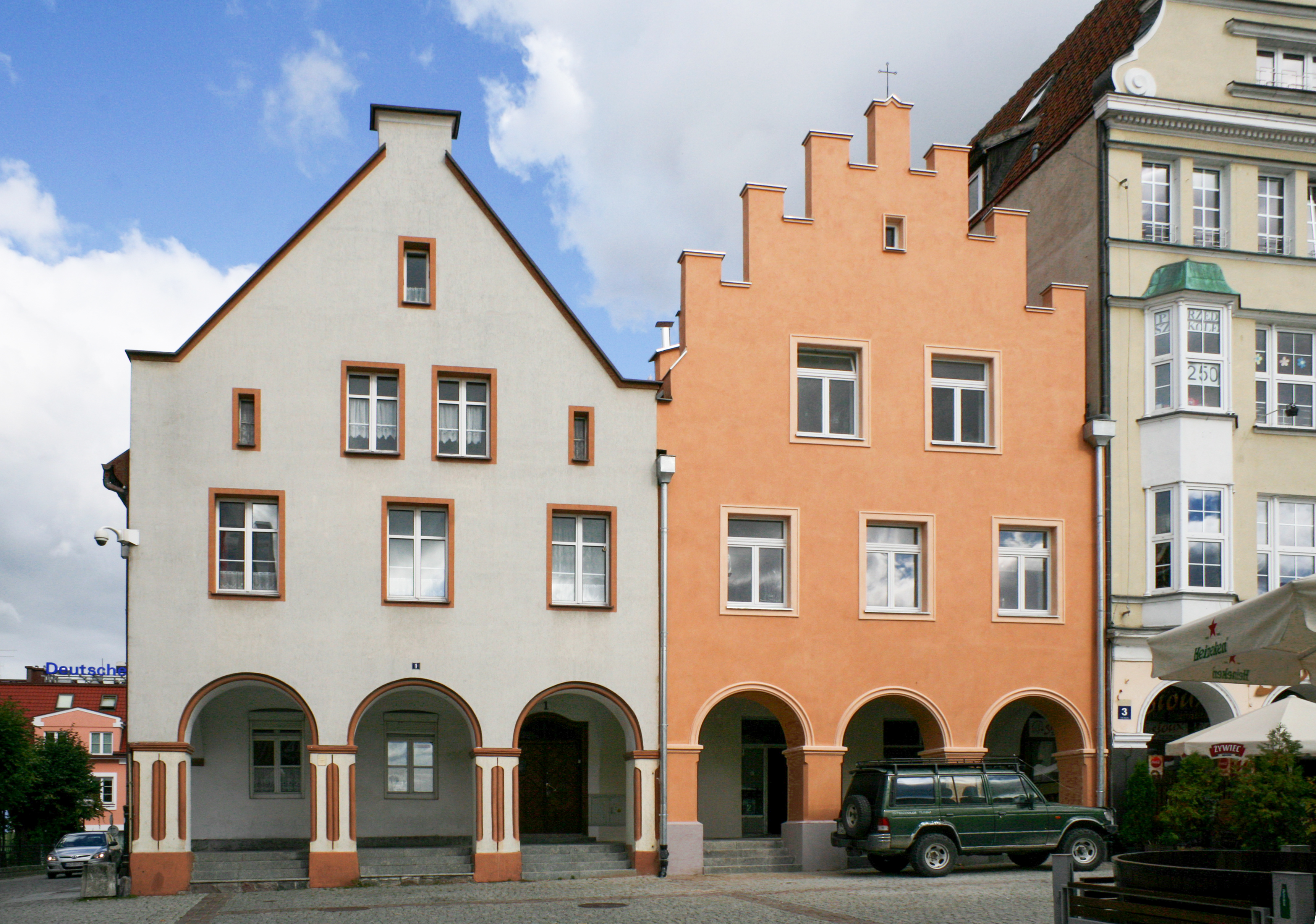 kamienica (podcieniowa) ul. Stare Miasto 1, Miasto Olsztyn